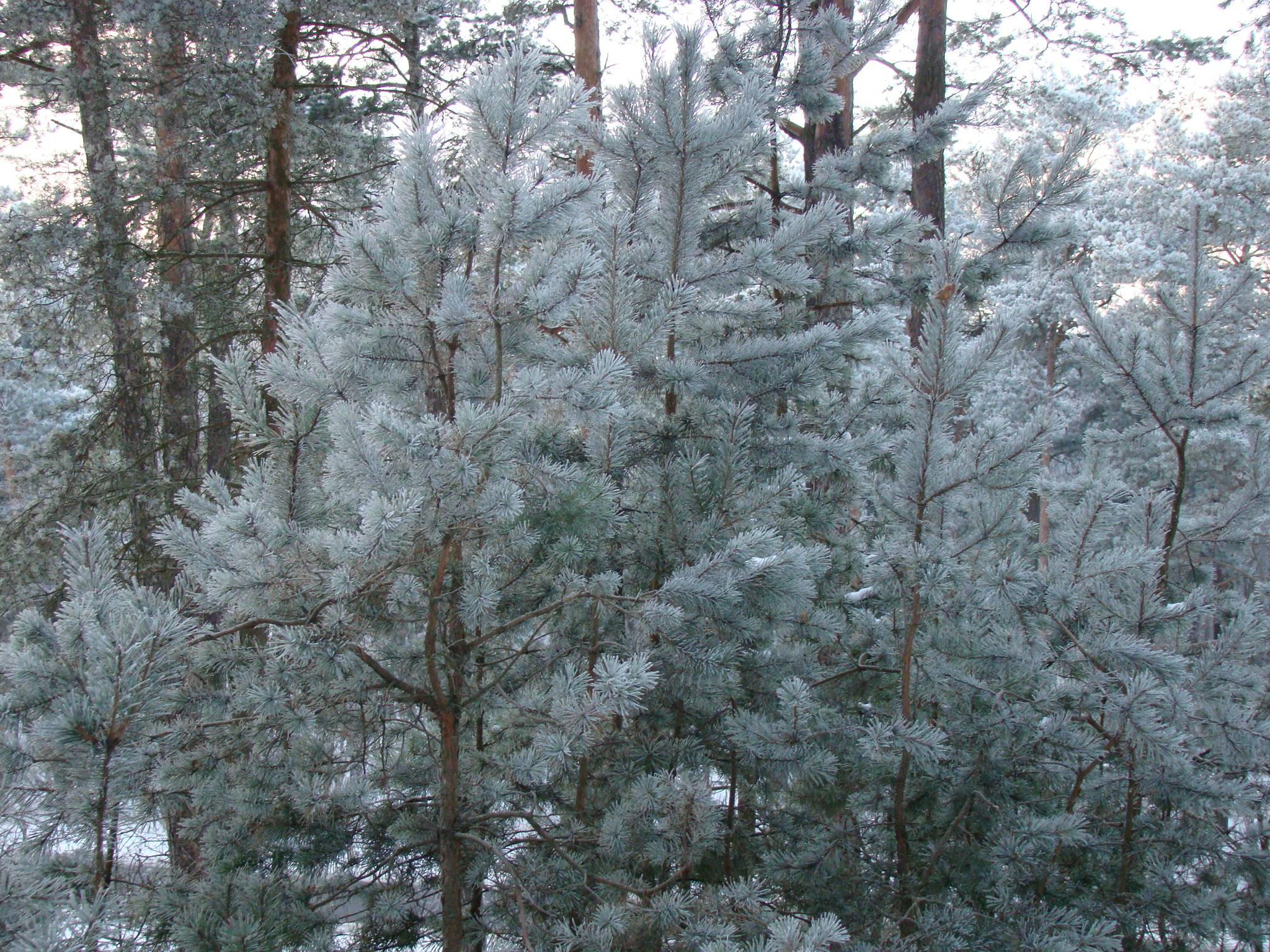 Klaipėda, Lithuania